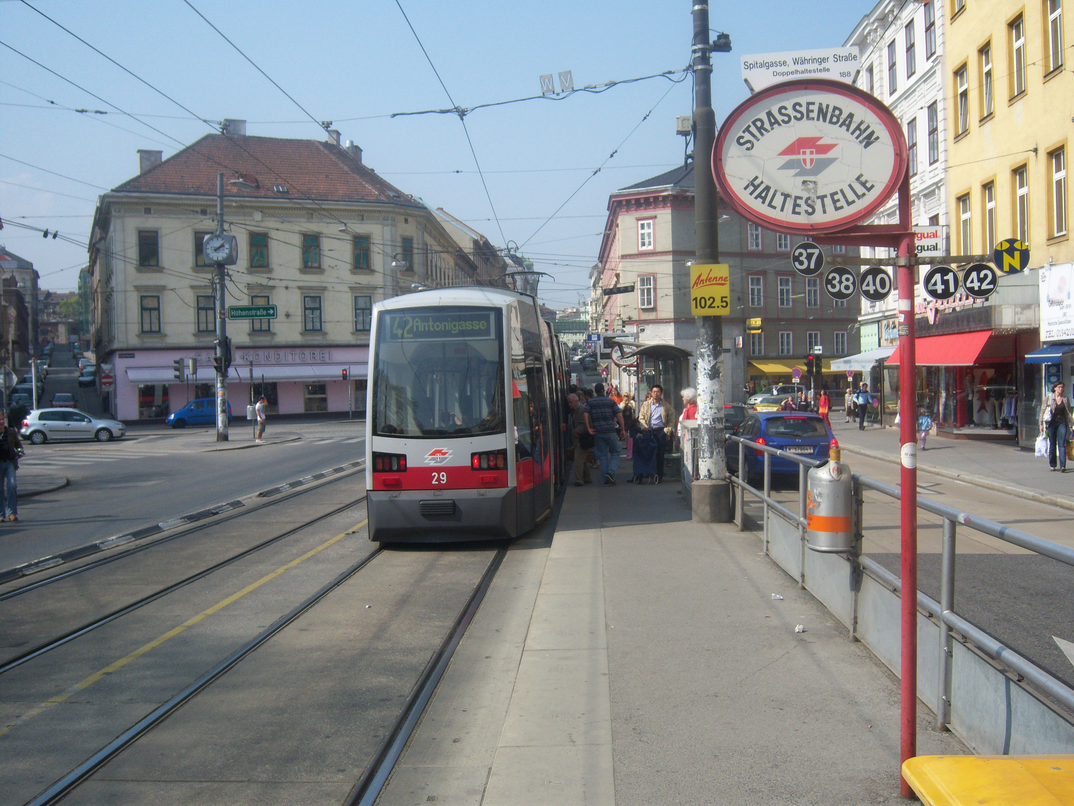 Zug der Linie 42 in der Währinger Straße